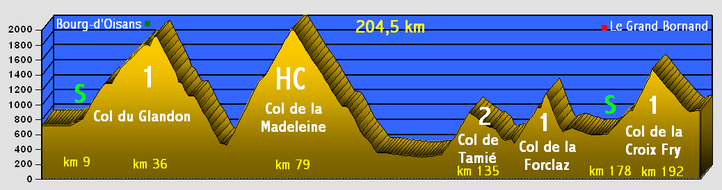 Das Profil der 17. Etappe bei der Tour de France 2004